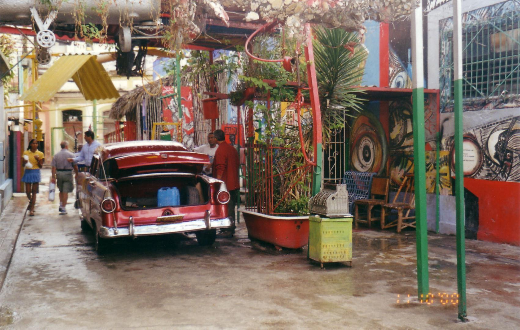 Callejon de Hemel, Havana